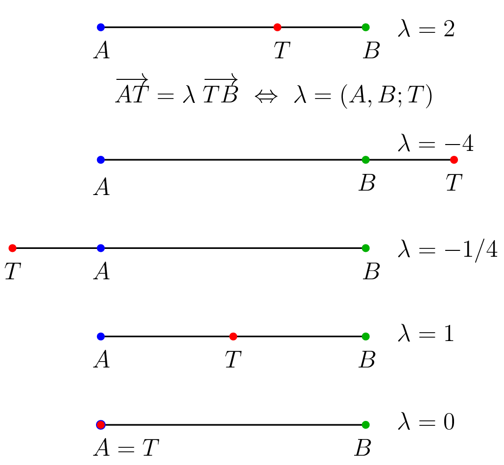 Definition des Teilverhältnisses und Spezialfaelle